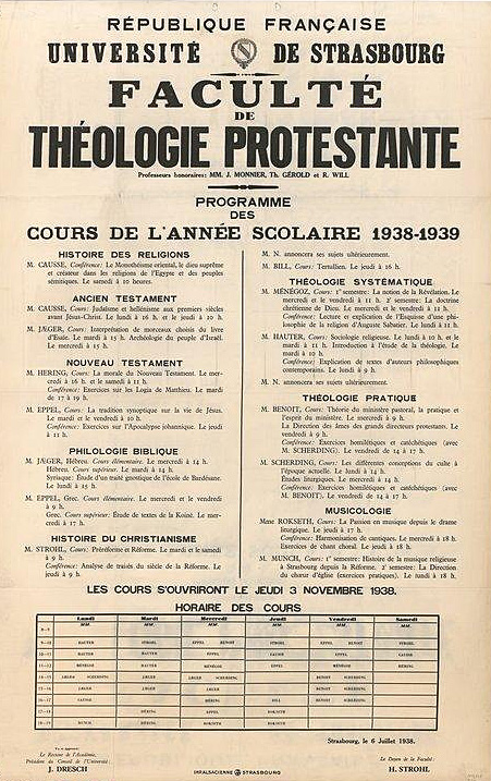 Programme de cours. Université de Strasbourg. Faculté de Théologie protestante, Strasbourg 1938/39. Bibliothèque nationale et universitaire de Strasbourg